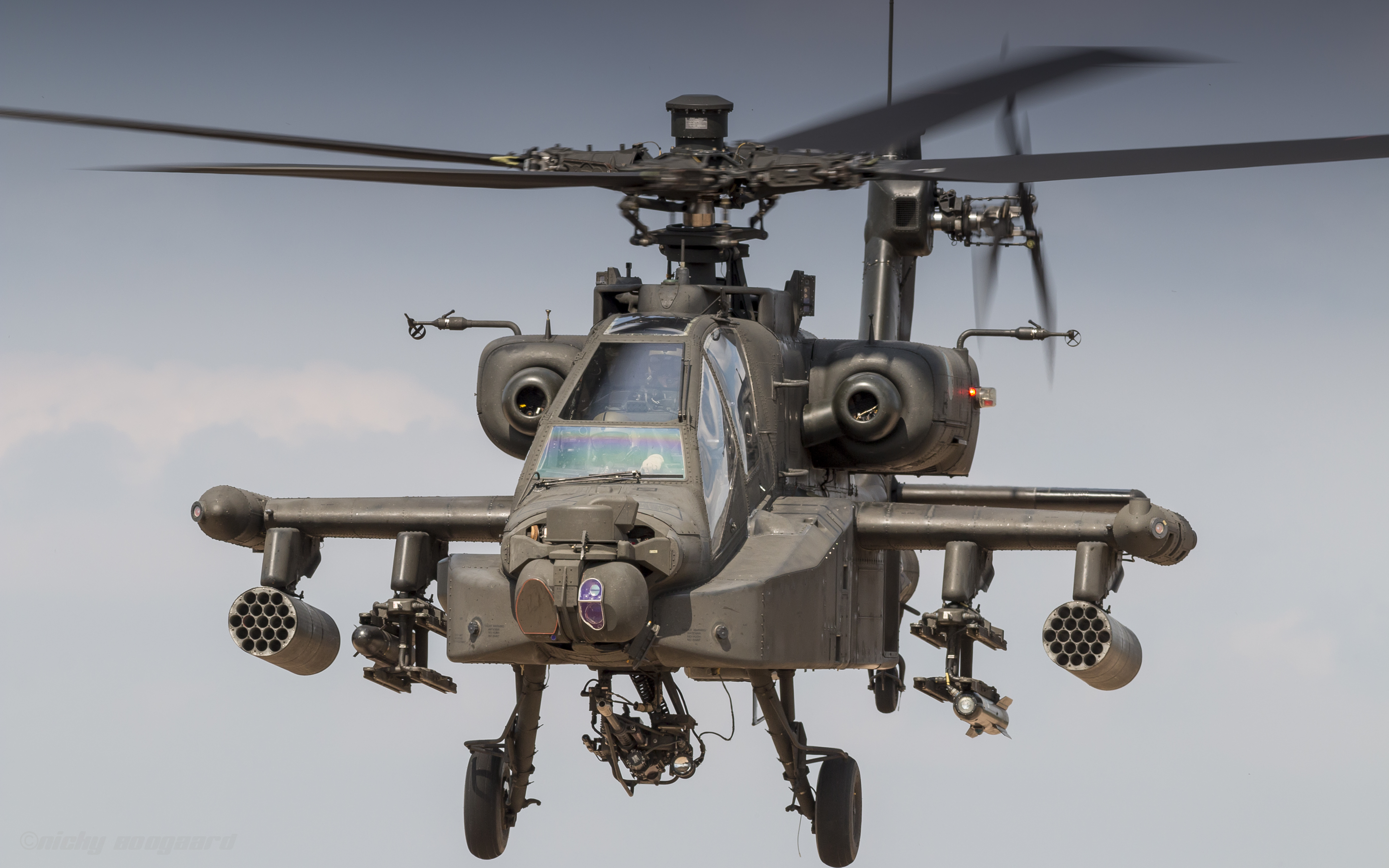 Oirschotse Heide, the Netherlands